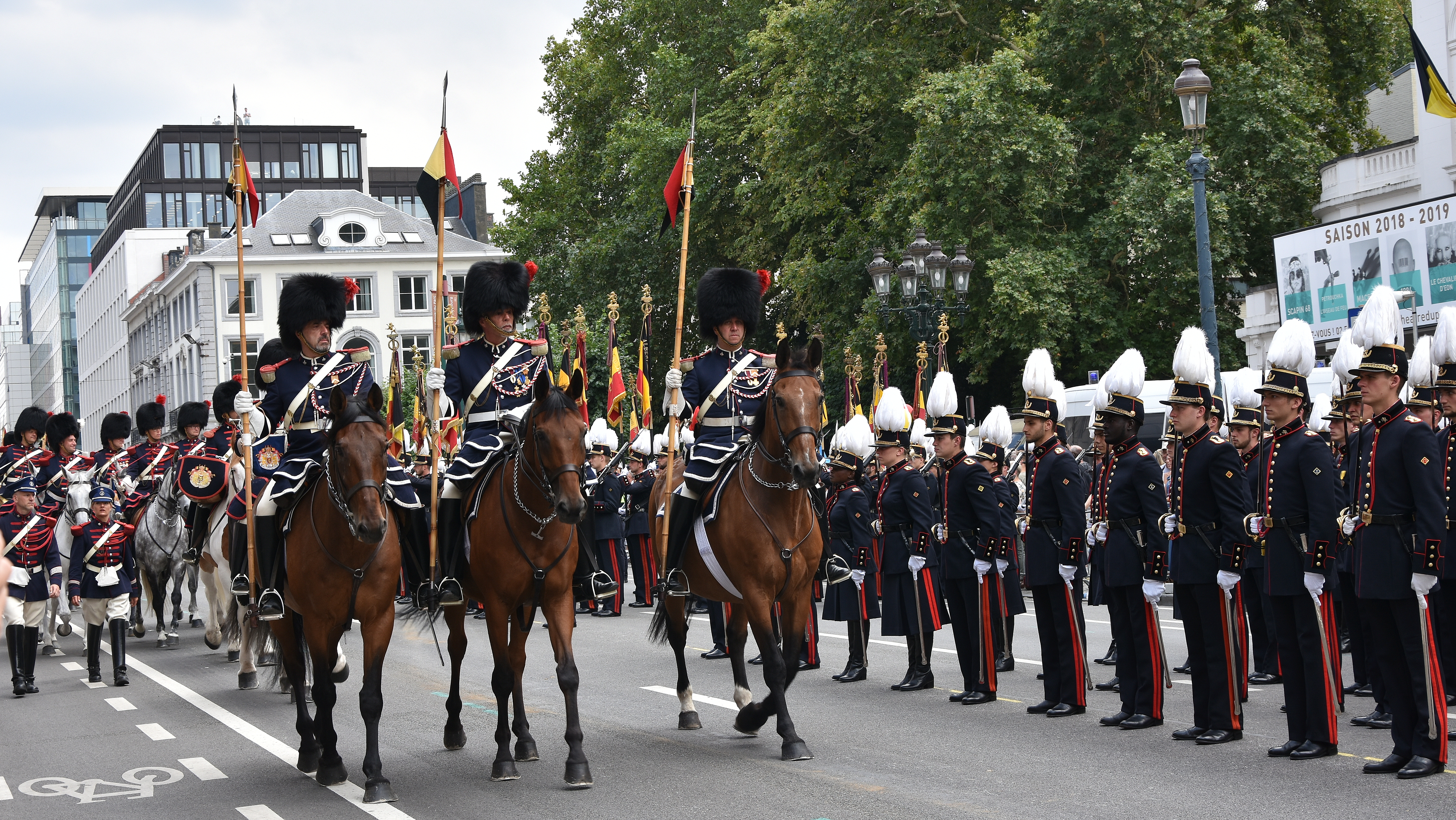 Koninklijke Militaire School (België) - Nationaal defilé 21-07-2018 en koninklijke escorte This photo of immaterial heritage has been taken in the Brussels Capital Region